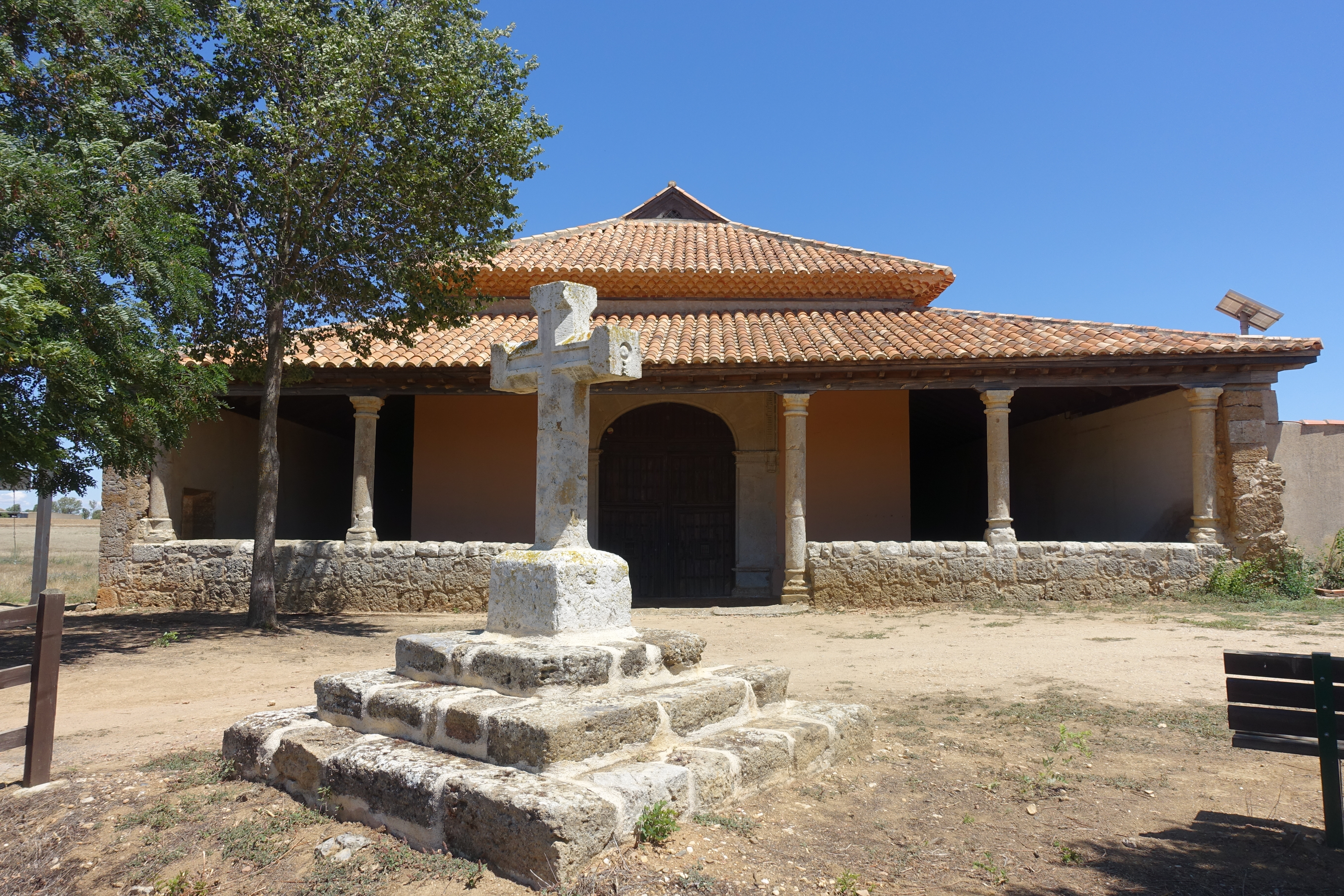 Ermita de Santa Ana, en Pozuelo de la Orden (Valladolid, España).